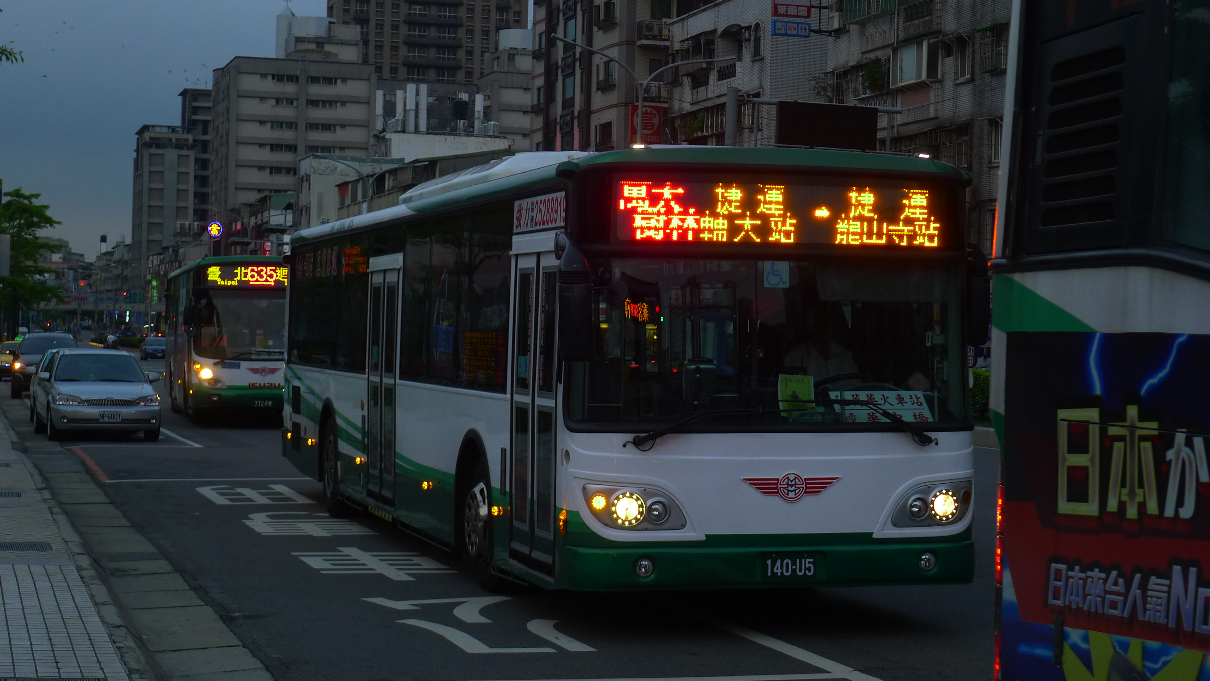 三重客運140-U5行駛台北捷運萬大樹林線先導公車。